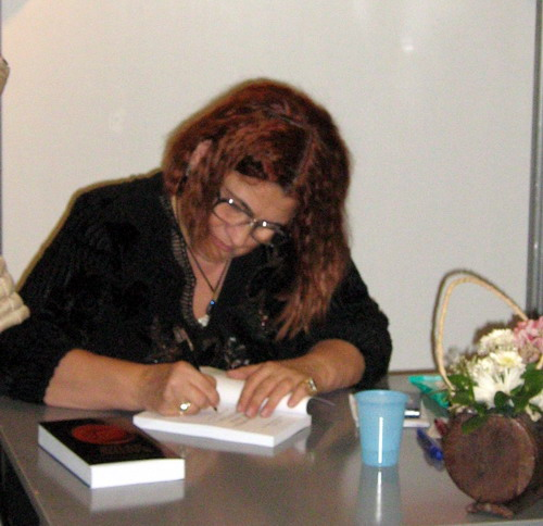 Љиљана Хабјановић-Ђуровић (1953), књижевница на сајму књига, 22. октобра 2007. у Београду потписује своје књиге.